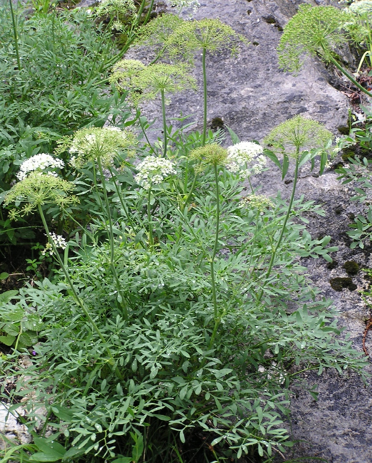 Laserpitium siler auf einem Kalkhang am Bad Ausseer See in Österreich.